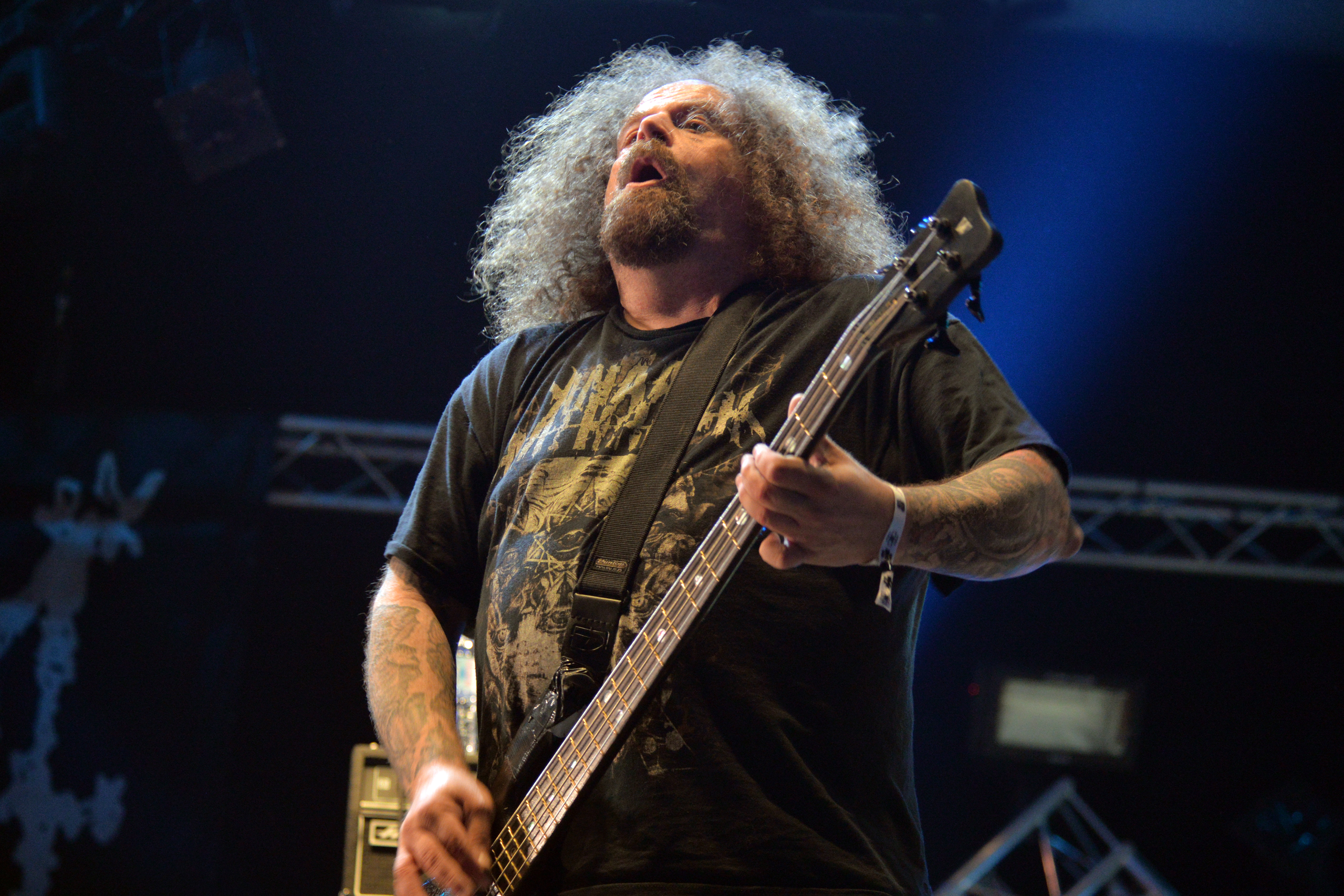 Le groupe anglais Napalm Death sur la scène Altar du Hellfest 2018.